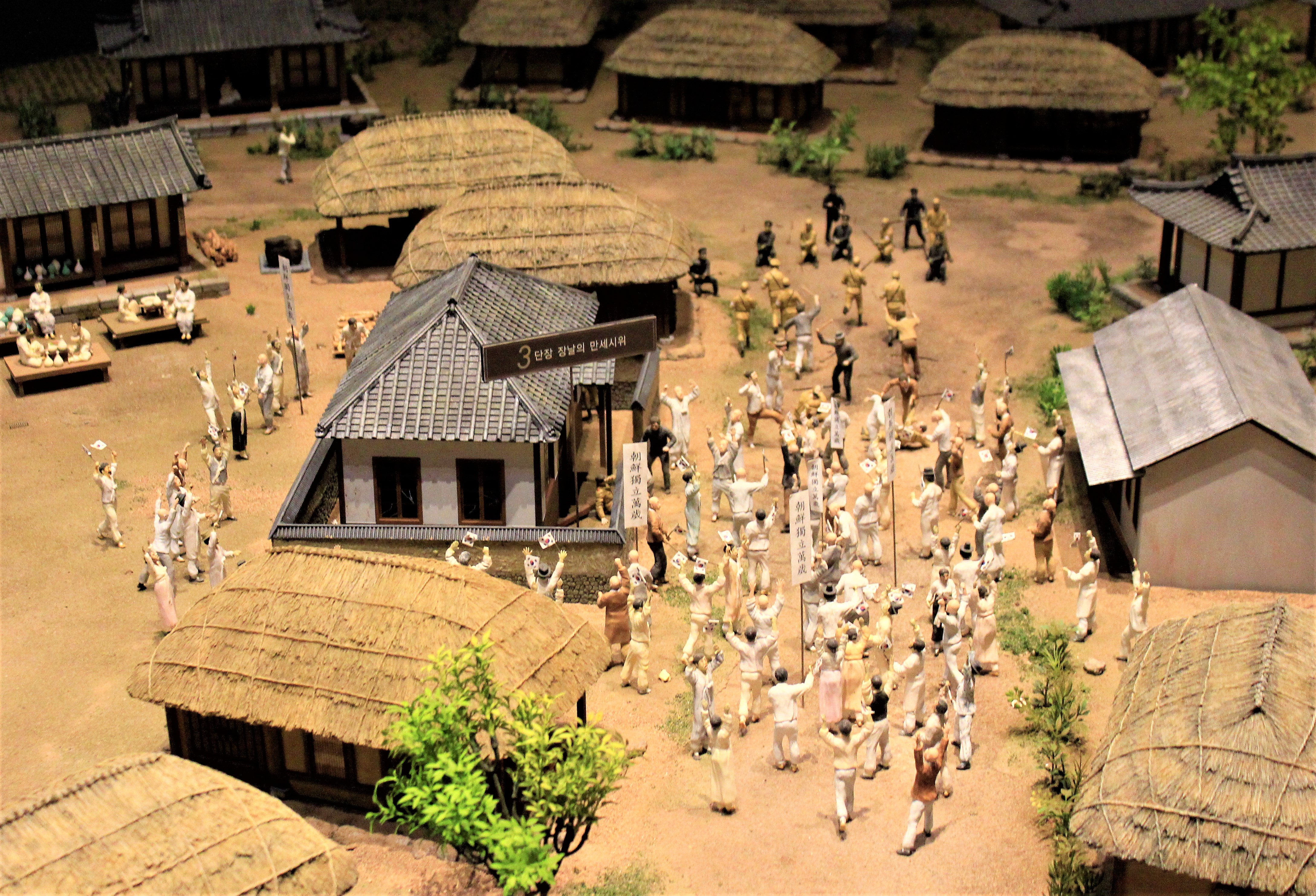 대한민국 경상남도 밀양독립운동기념관의 밀양 만세운동 재현 미니어처